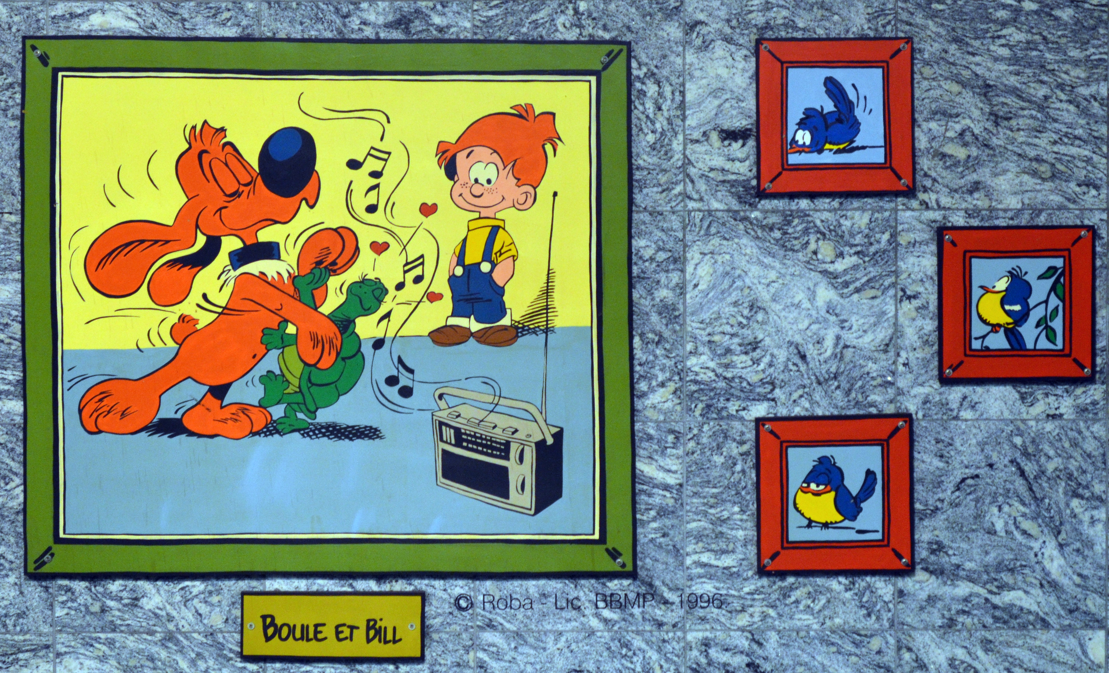 Charleroi (Belgique) - Station Janson du métro léger. Boule et Bill.